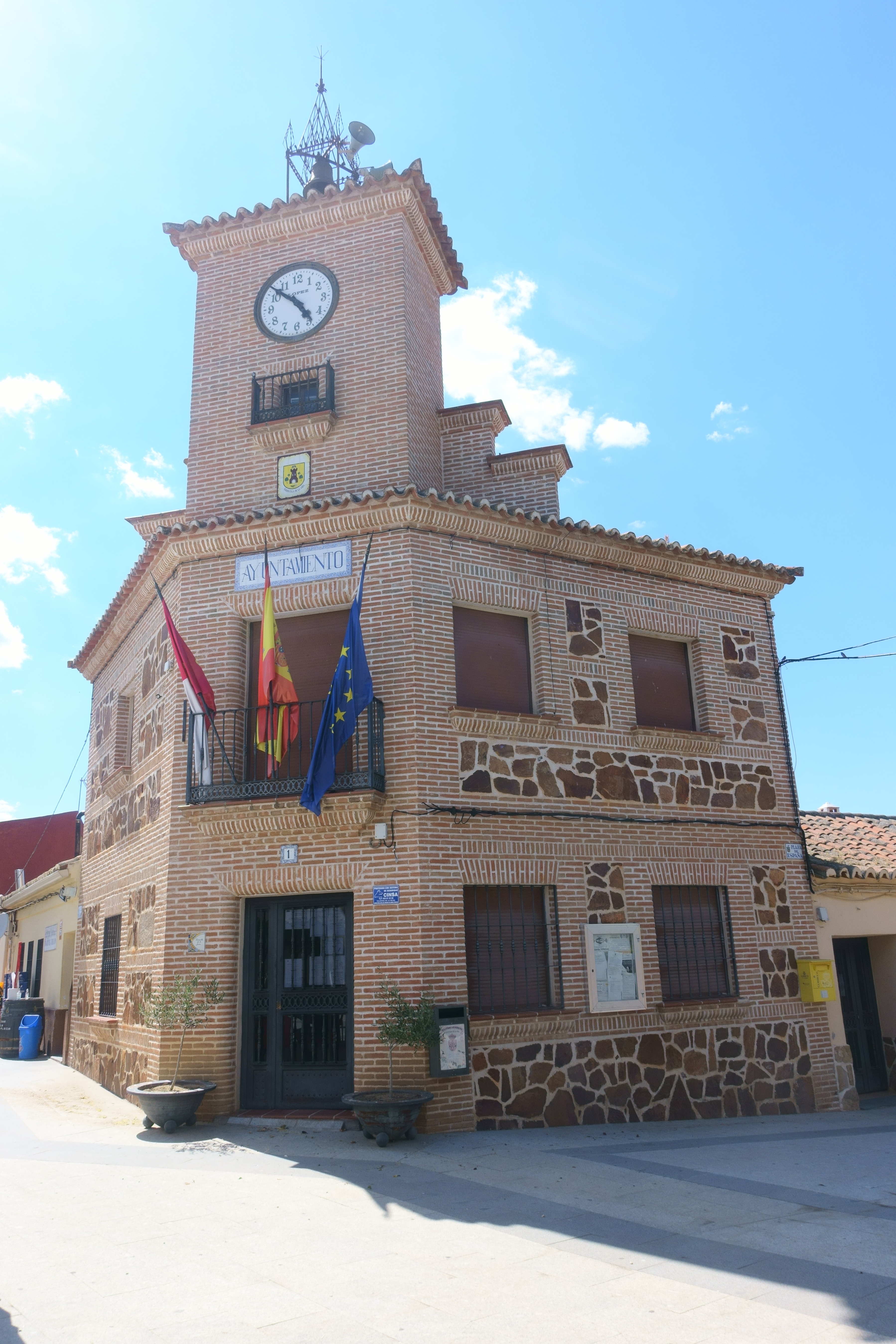 Casa consistorial de Torrecilla de la Jara (Toledo, España).